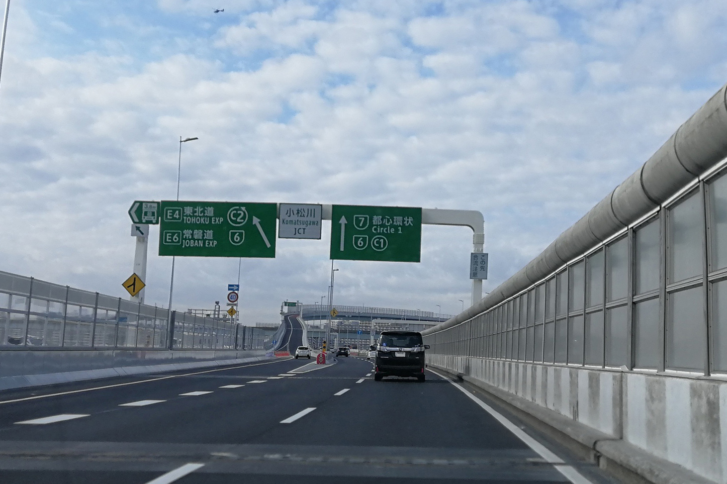 小松川ジャンクション（首都高7号線側より撮影）